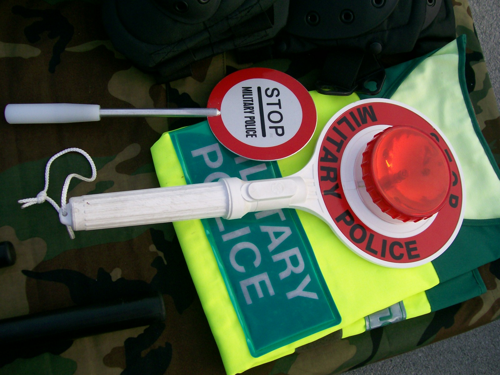 Pribor vojne police HV